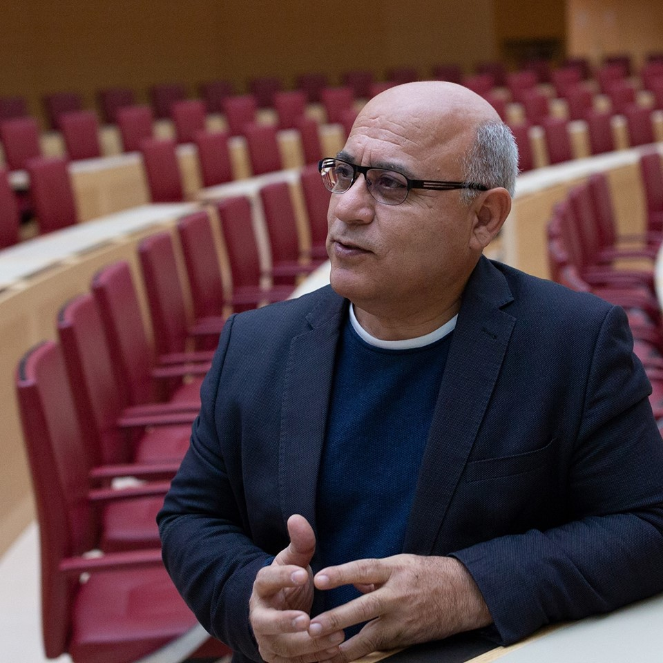 Cemal Bozoglu, Landtag Bayern, Aufgenommen im Januar 2019